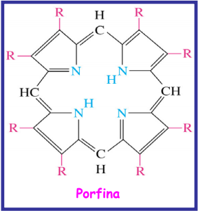 Porfina